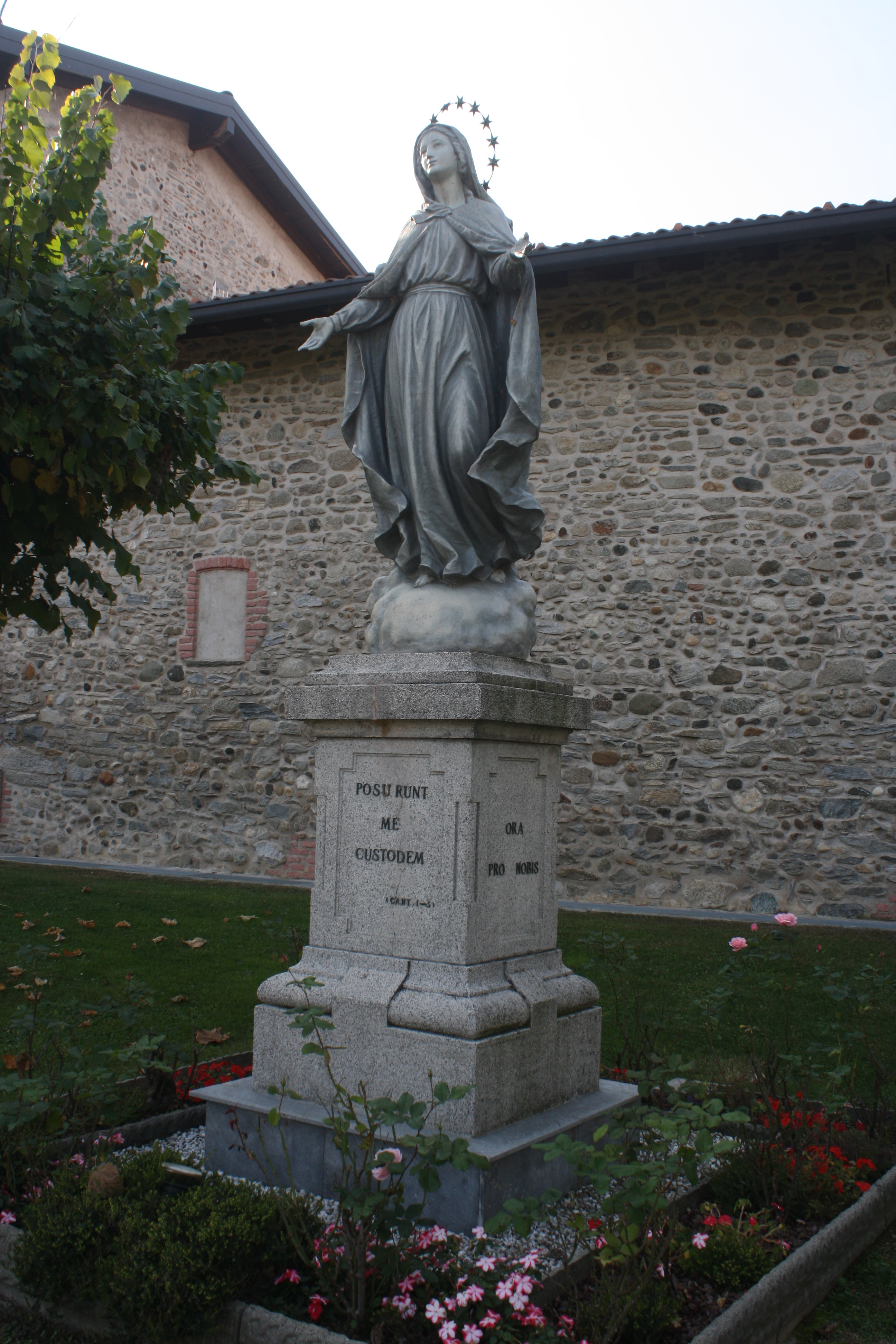 La statua di Santa Maria Annunciata accanto all'omonima chiesa a Brunello, in provincia di Varese.